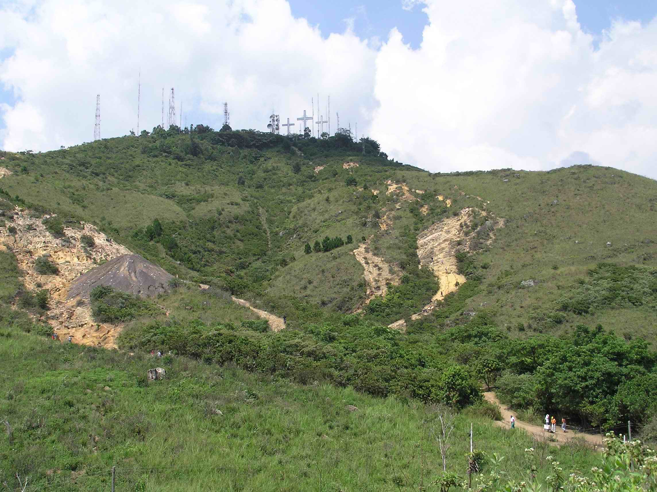 Cerro de las tres cruces Cali Colombia